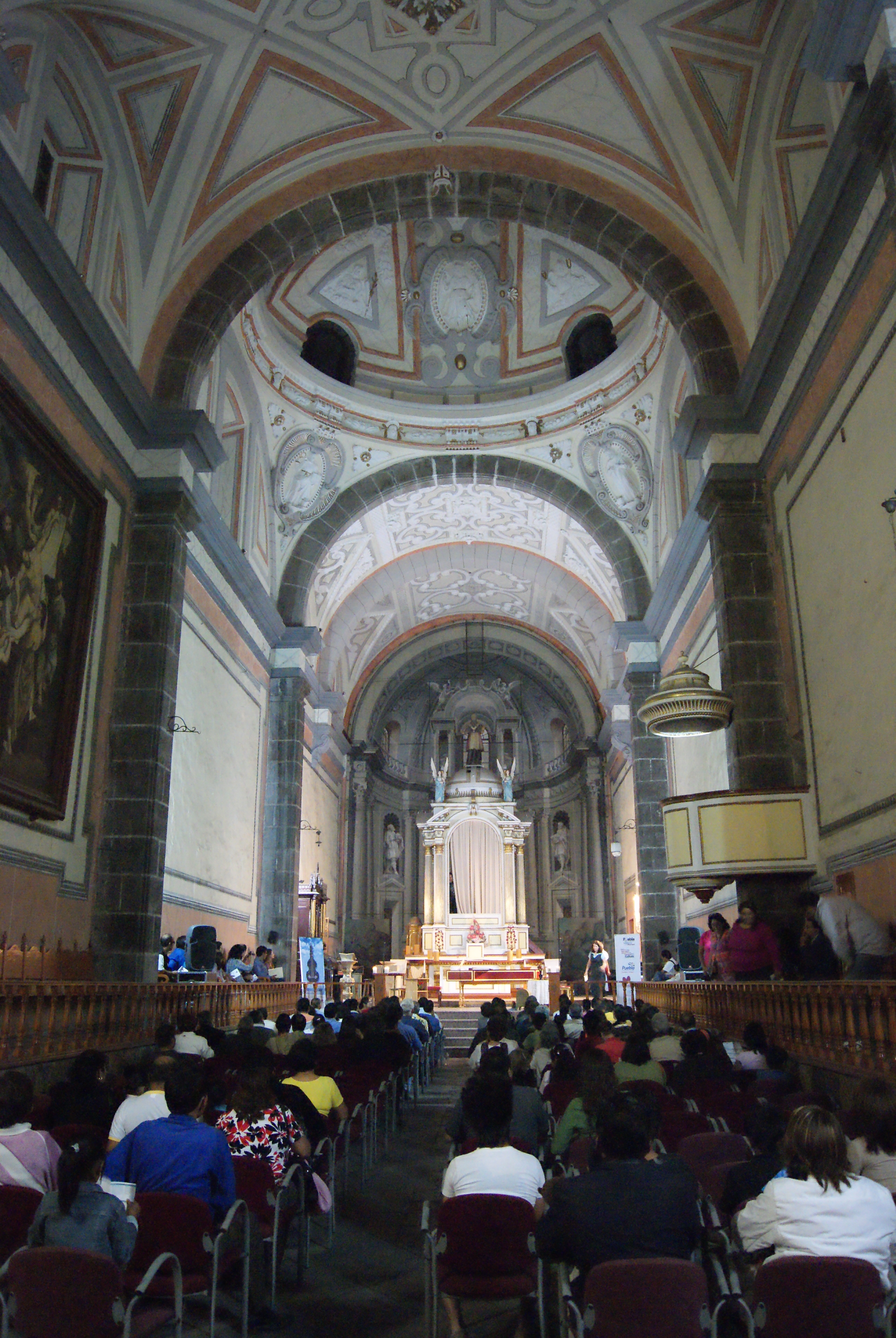 Interior de la Capilla de San Ildefonso, Puebla